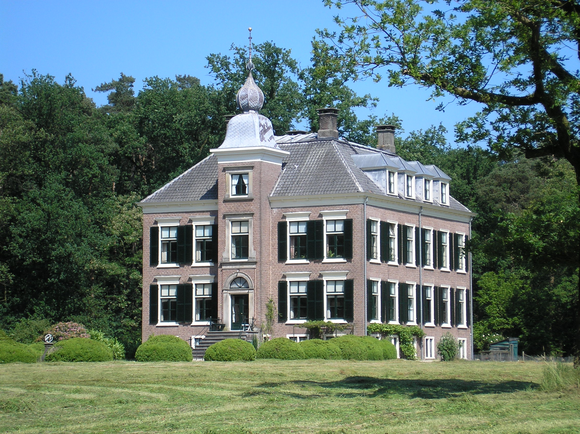 Foto van Huis te Leuvenum. Foto is gemaakt door gebruiker CdZ. De foto is gemaakt op 17 juni 2006. Eigen werk. De foto is vrijgegeven onder GFDL.